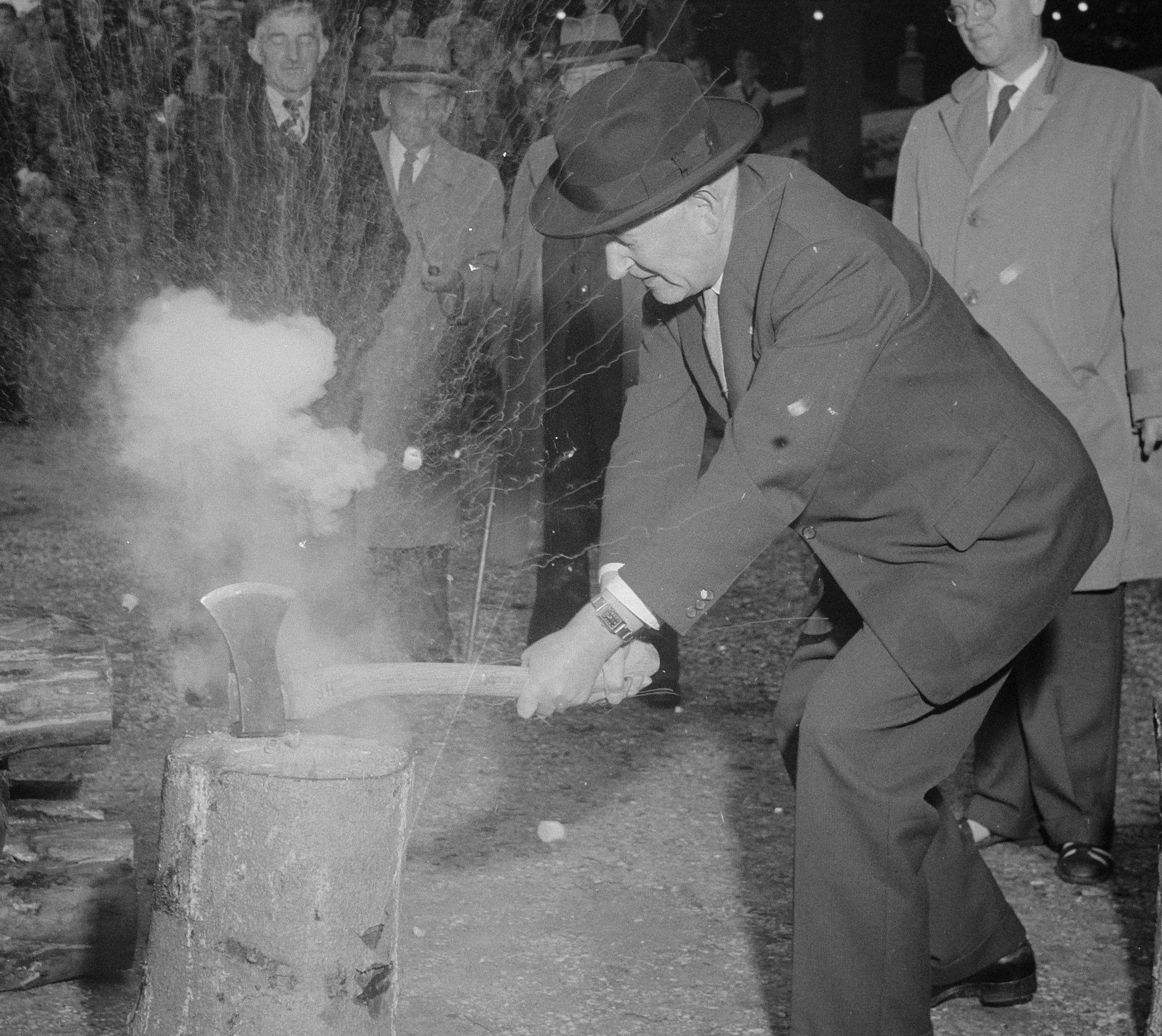 Collectie / Archief : Fotocollectie Anefo Reportage / Serie : [ onbekend ] Beschrijving : Wedstrijd in hakken en houtzagen in Nunspeet. Burgemeester H. Martens geeft de openingsklap Datum : 29 juli 1957 Locatie : Nunspeet Trefwoorden : burgemeesters, wedstrijden Persoonsnaam : H. Martens Fotograaf : Pot, Harry / Anefo Auteursrechthebbende : Nationaal Archief Materiaalsoort : Negatief (zwart/wit) Nummer archiefinventaris : bekijk toegang 2.24.01.03 Bestanddeelnummer : 908-8170